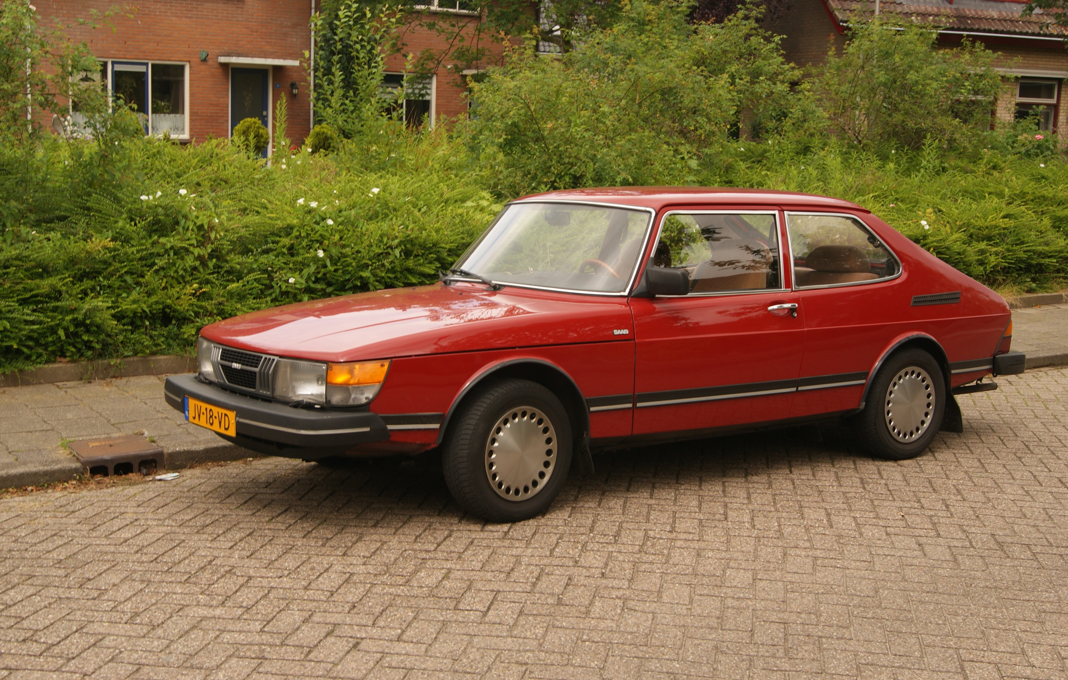 JV-18-VD